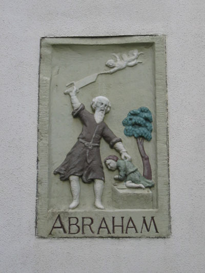 Le Béguinage (Begijnhof) est un jardin fermé fondé au XIVe siècle, à Amsterdam. Cette plaque disposée sur l'un des bâtiments représente le "sacrifice" d'Isaac.